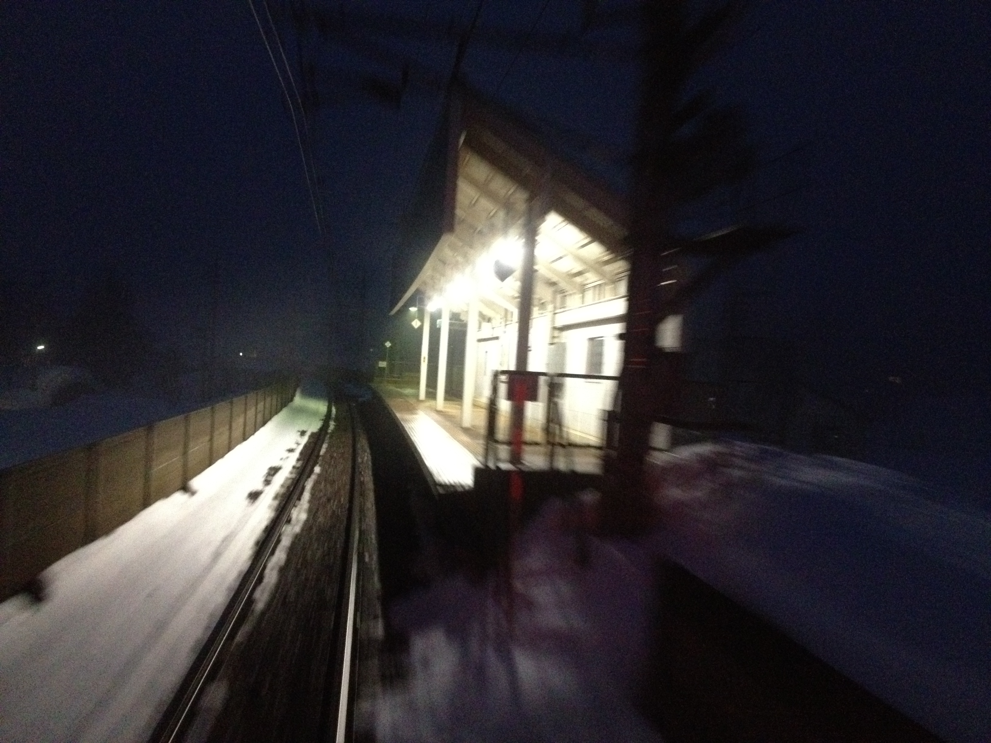 魚沼丘陵駅構内